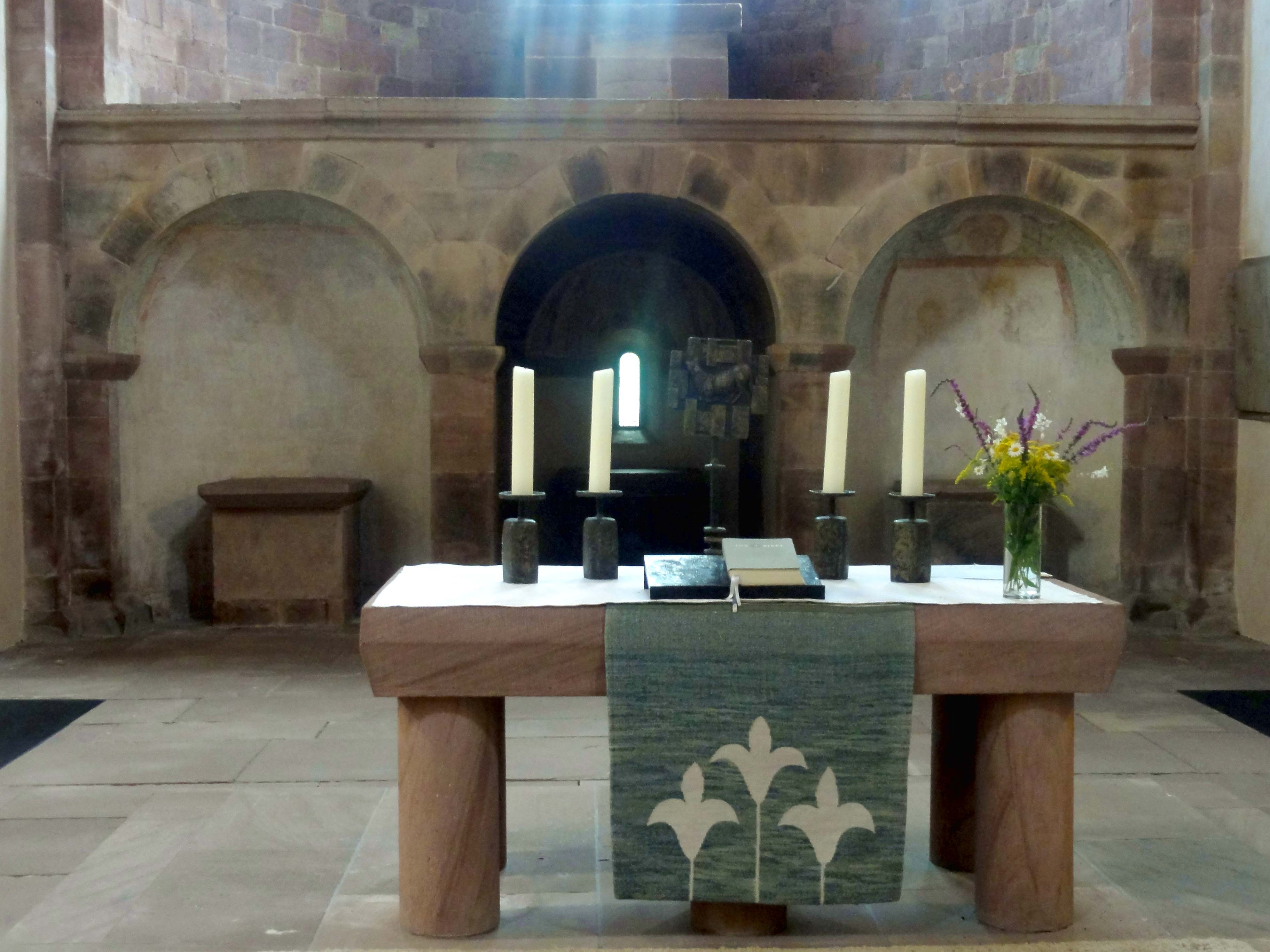 Klosterkirche, Innenansicht - Beschreibung siehe Dateititel.